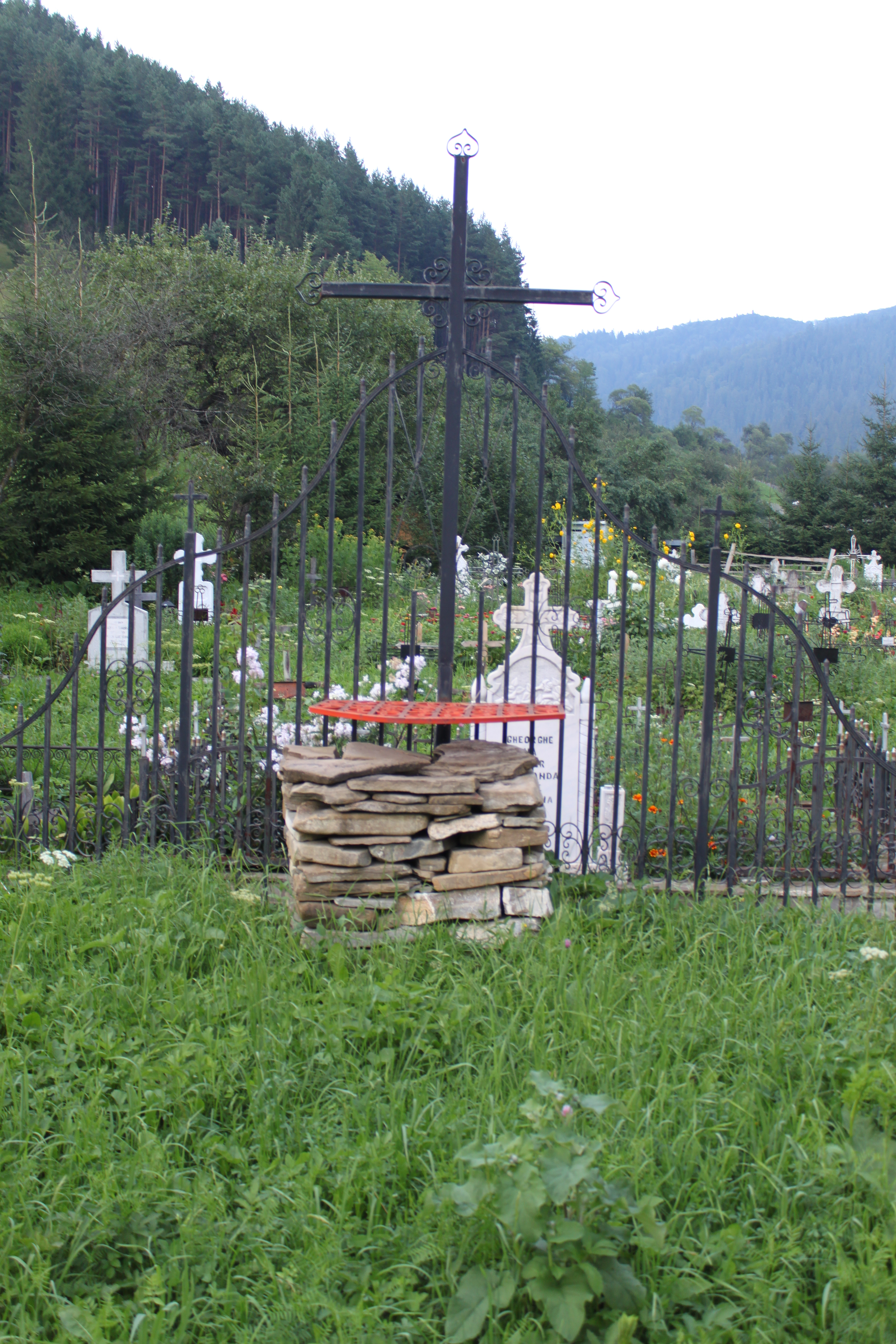 Locul unde se afla biserica de lemn din Petru Vodă, judeţul Neamţ.